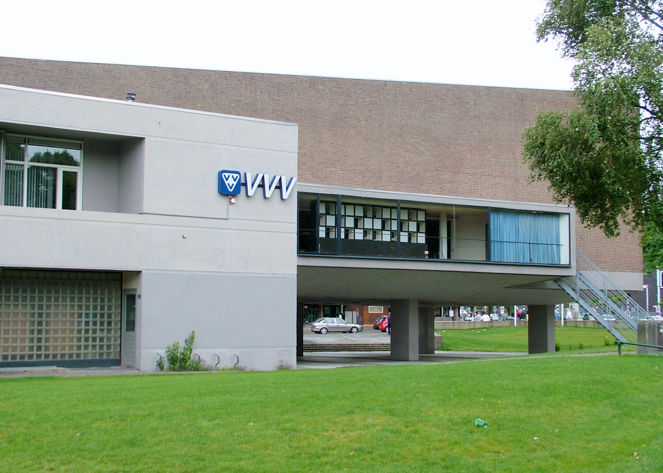 Nijmegen: VVV en Stadsschouwburg